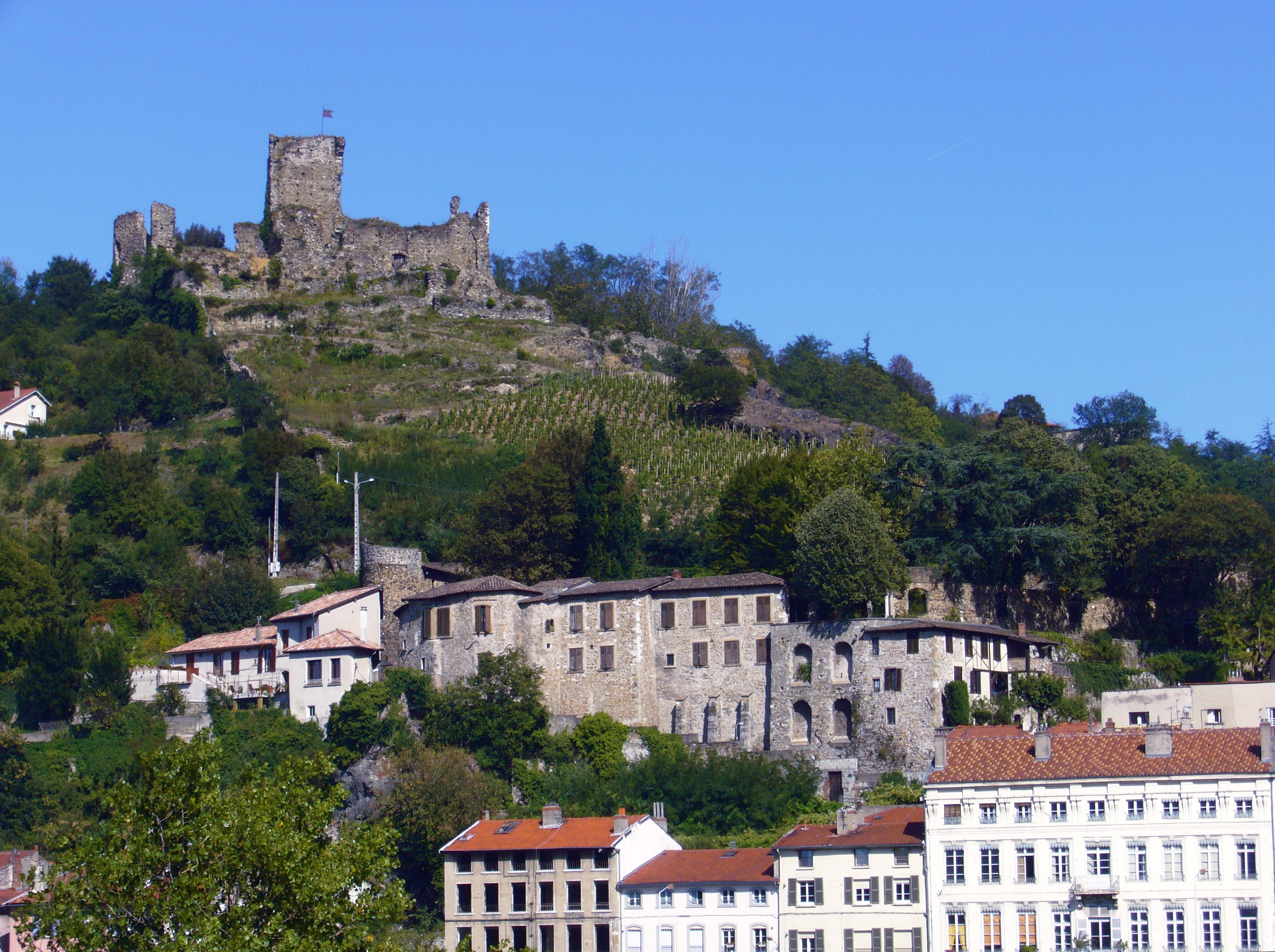 Vue du Château de La Bâtie près de Vienne.